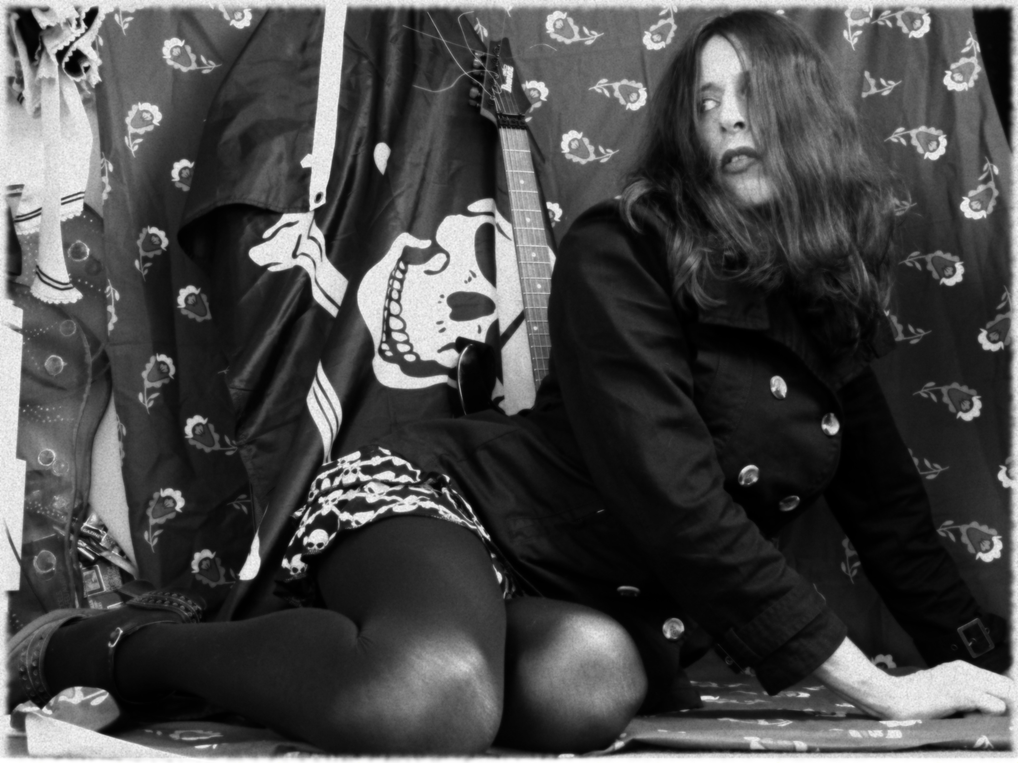 No Gender No Master, Autoportrait